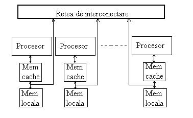 Arhitectura CC-NUMA (Cache Coherent Non-Uniform Memory-Access)